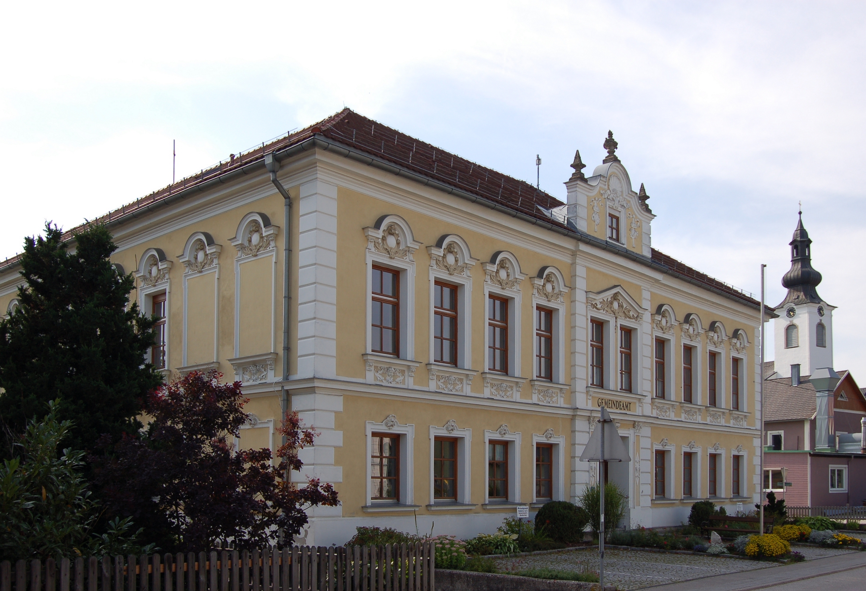 Das Gemeindeamt in Lembach im Mühlkreis (Oberösterreich) wurde in einer ehemaligen Schule eingerichtet, das zwischen 1905 und 1906 errichtet worden war. Es handelt sich dabei um einen zweigeschoßigen Bau mit Walmdach und Dachhäuschen über seichtem Mittelrisalit. Der Fassadendekor ist späthistoristisch.